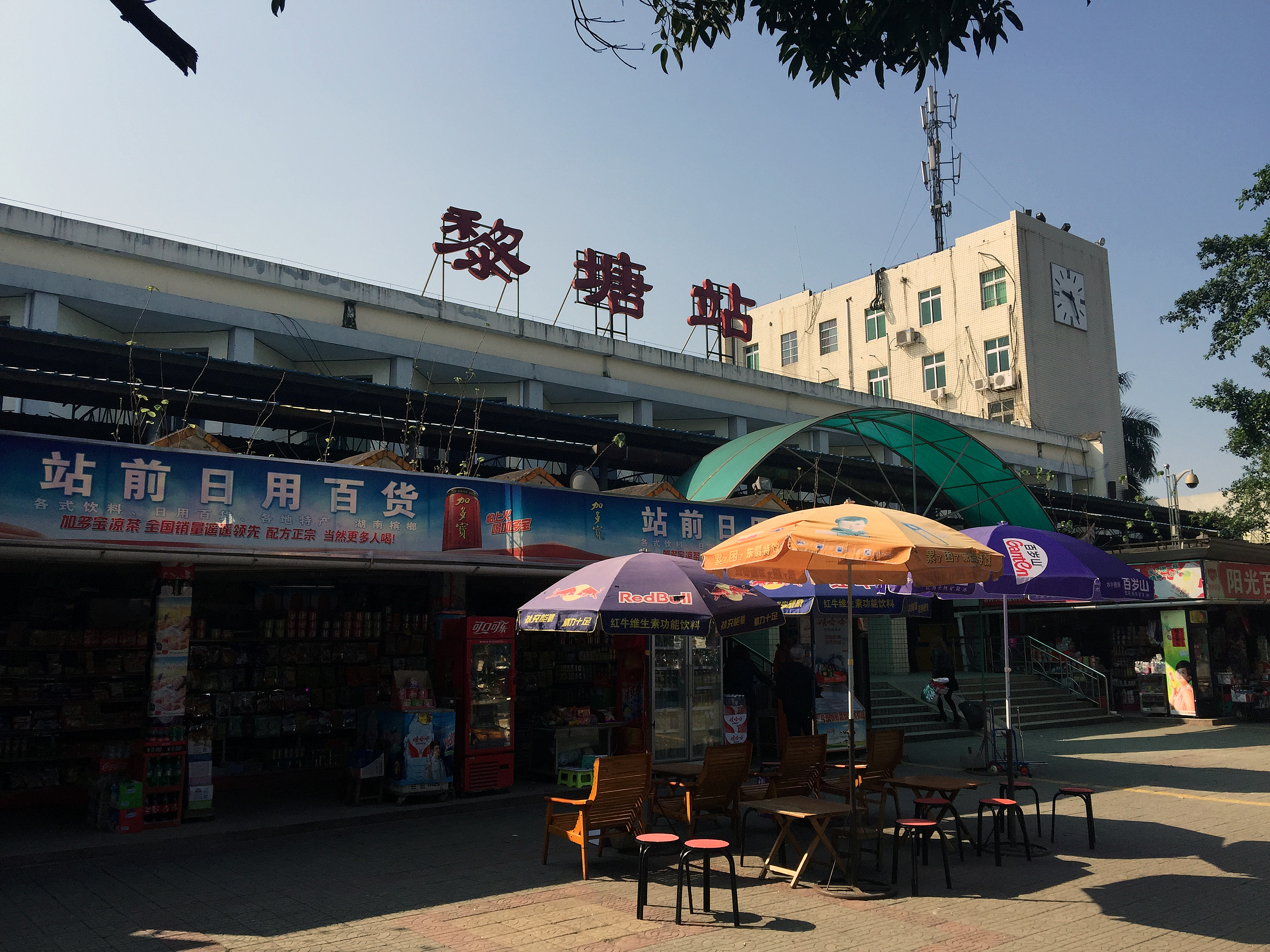 中国铁路黎塘站外观